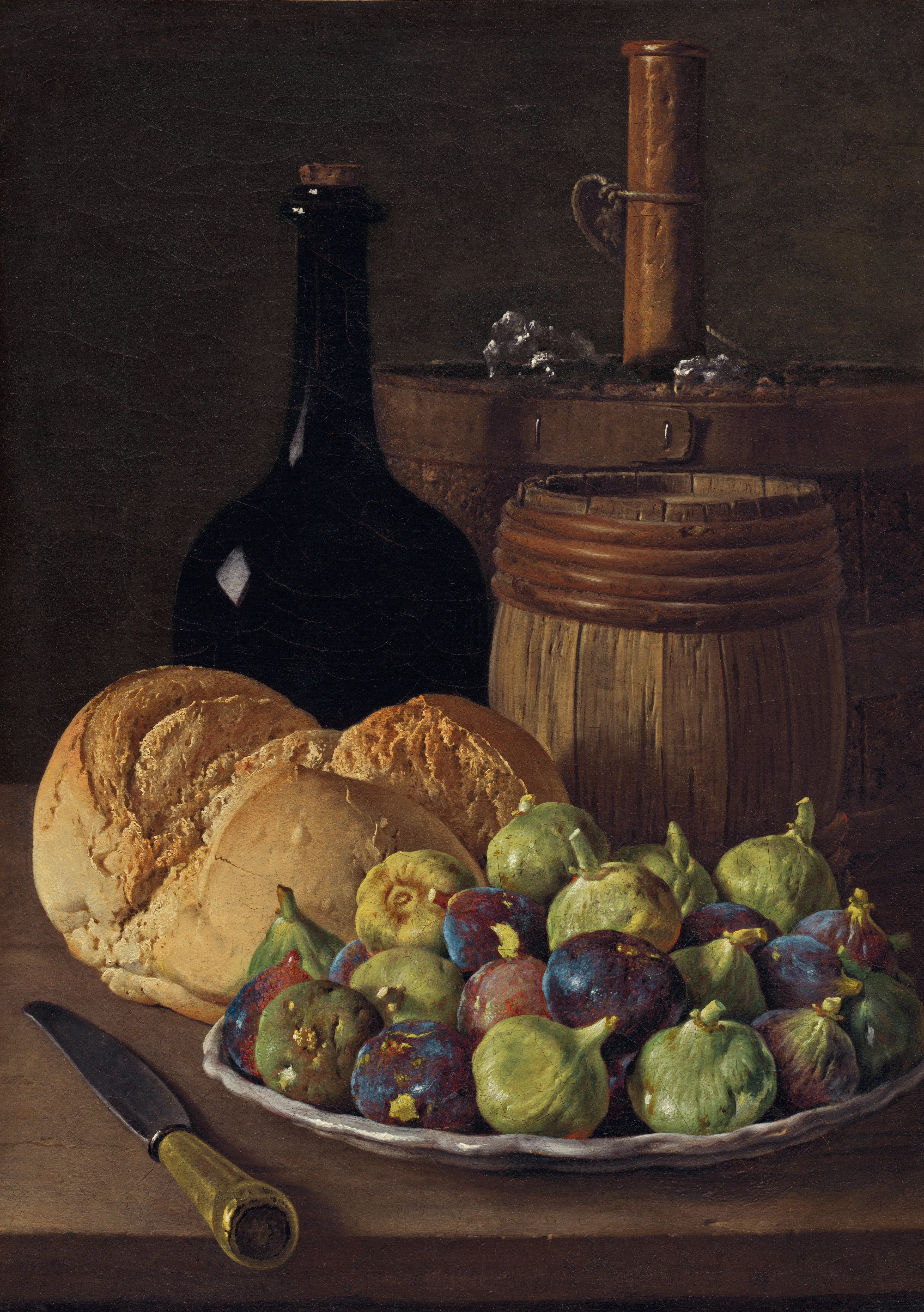 Natura morta amb figues i pa, pintua a l'oli realitzada